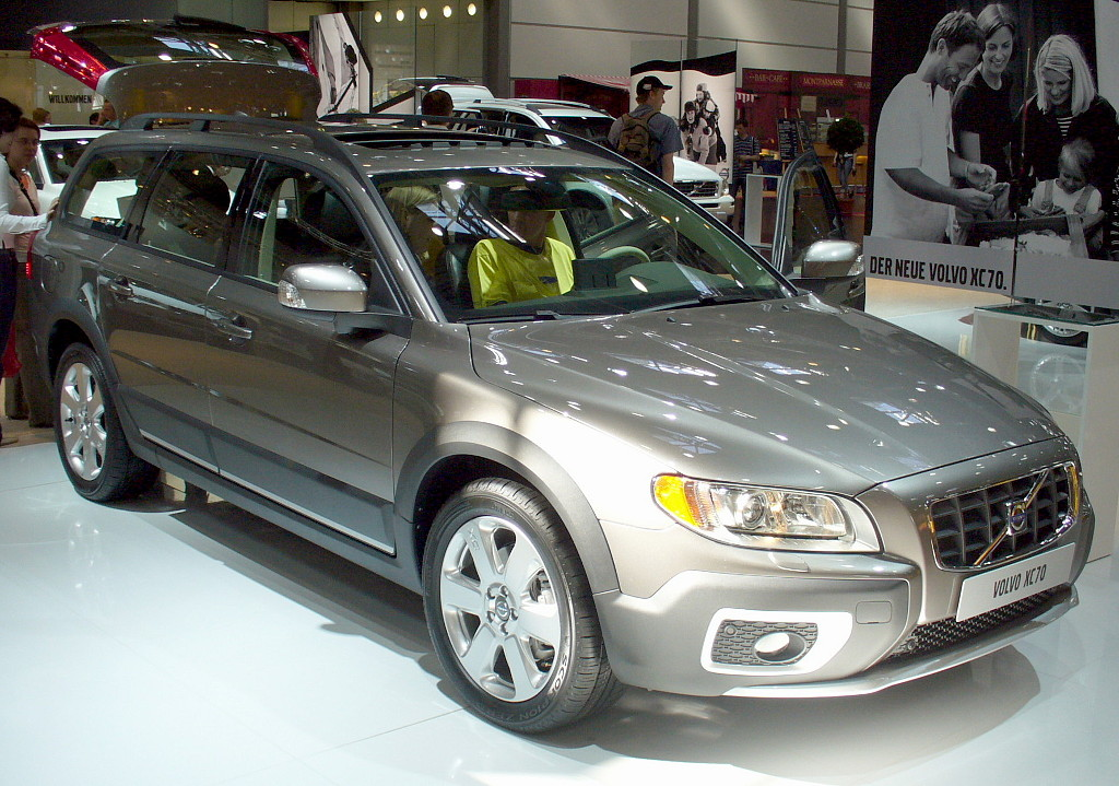 Volvo XC70